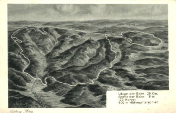 Nürburgring